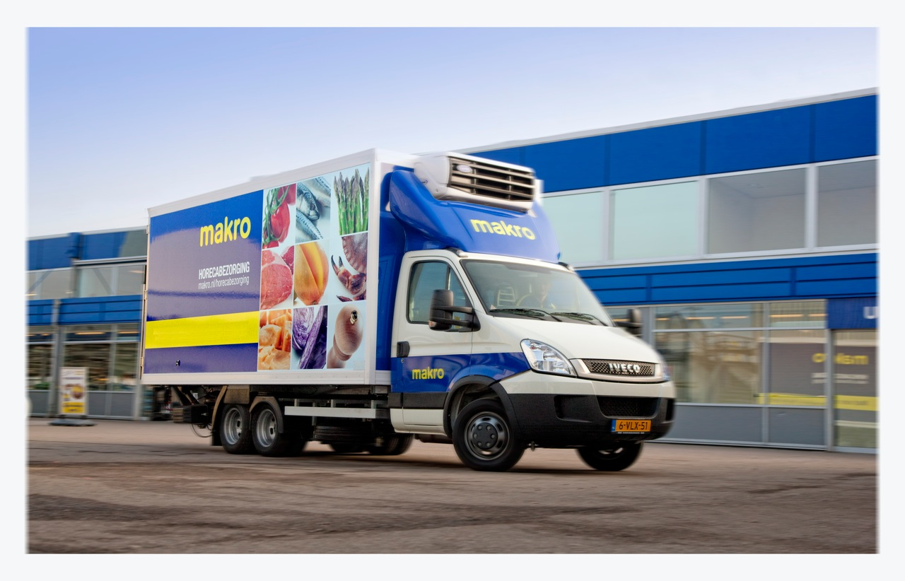 Nieuwe bezorgdienst Makro